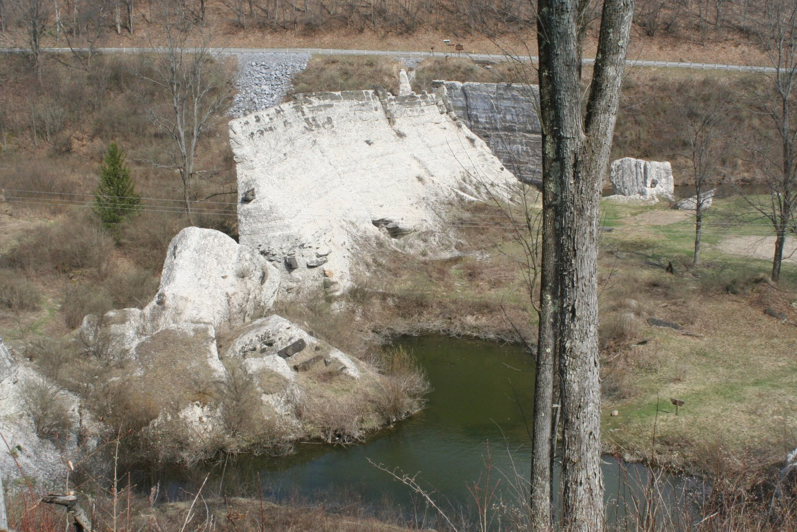 Austin Dam - Austin, PA